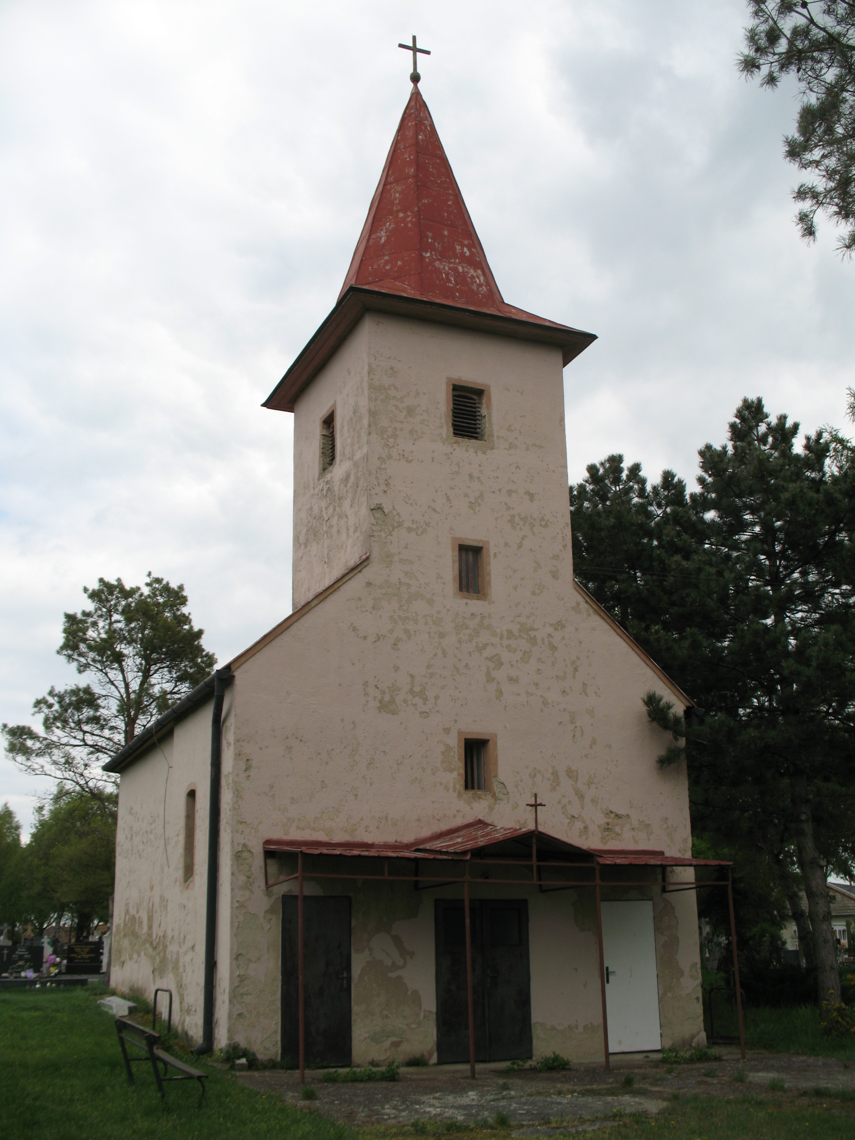 Jászfalu